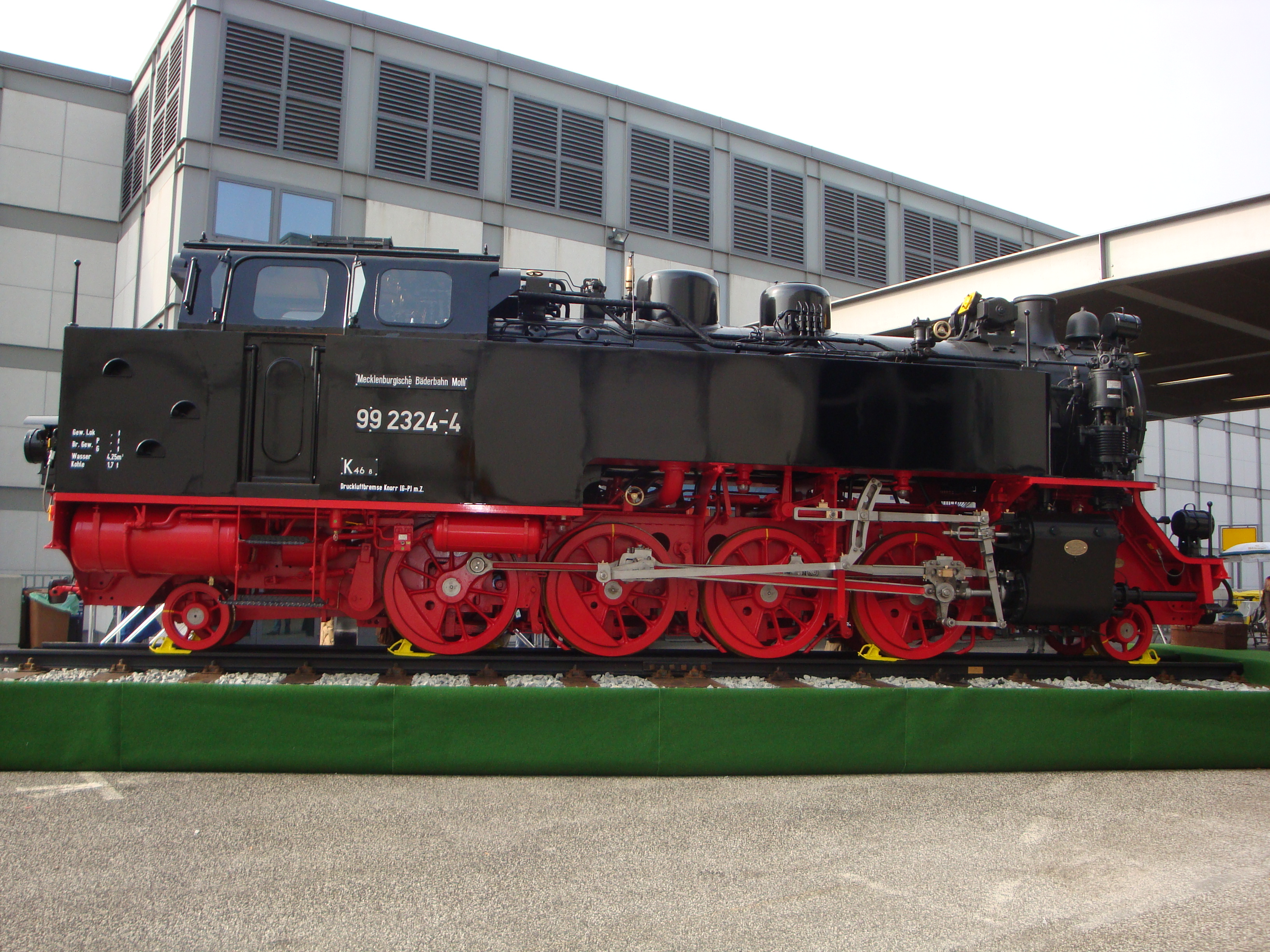 Parowóz wąskotorowy 99 2324 na targach turystycznych ITB w Berlinie.